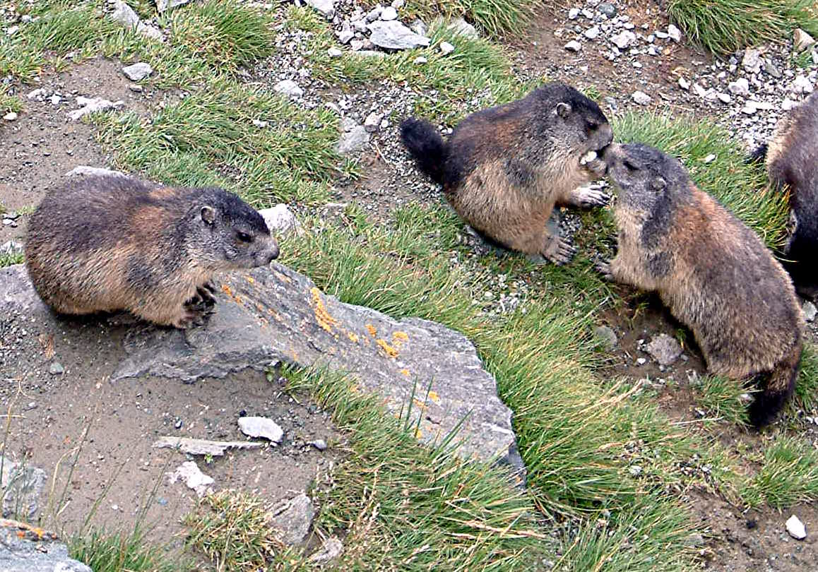 Kärnten/Bezirk Spittal an der Drau: Marmota_marmota,_Der_Kuss (Fotografin:Peggy)